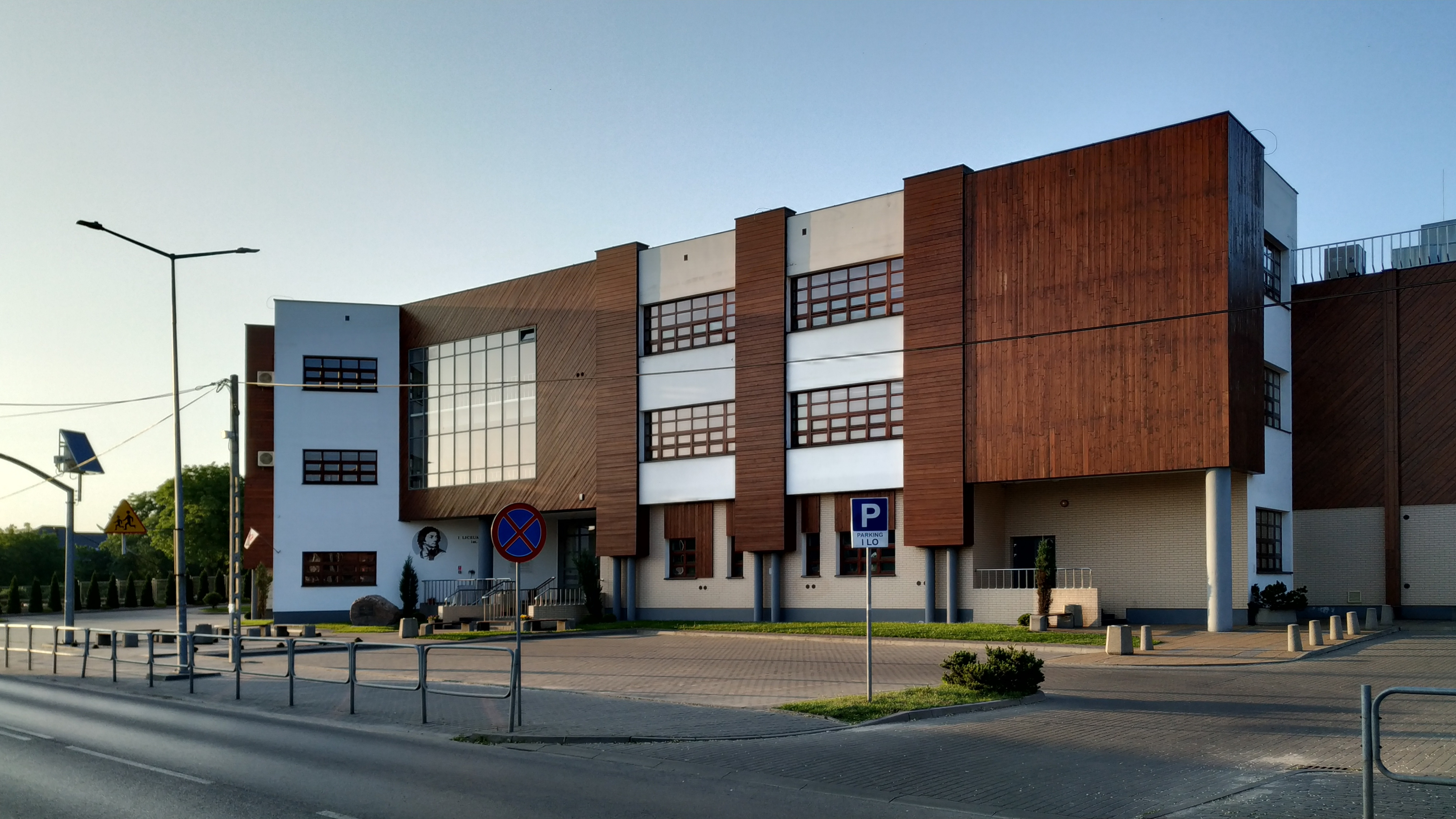 Budynek I Liceum Ogólnokształcącego im. Tadeusza Kościuszki w Łukowie